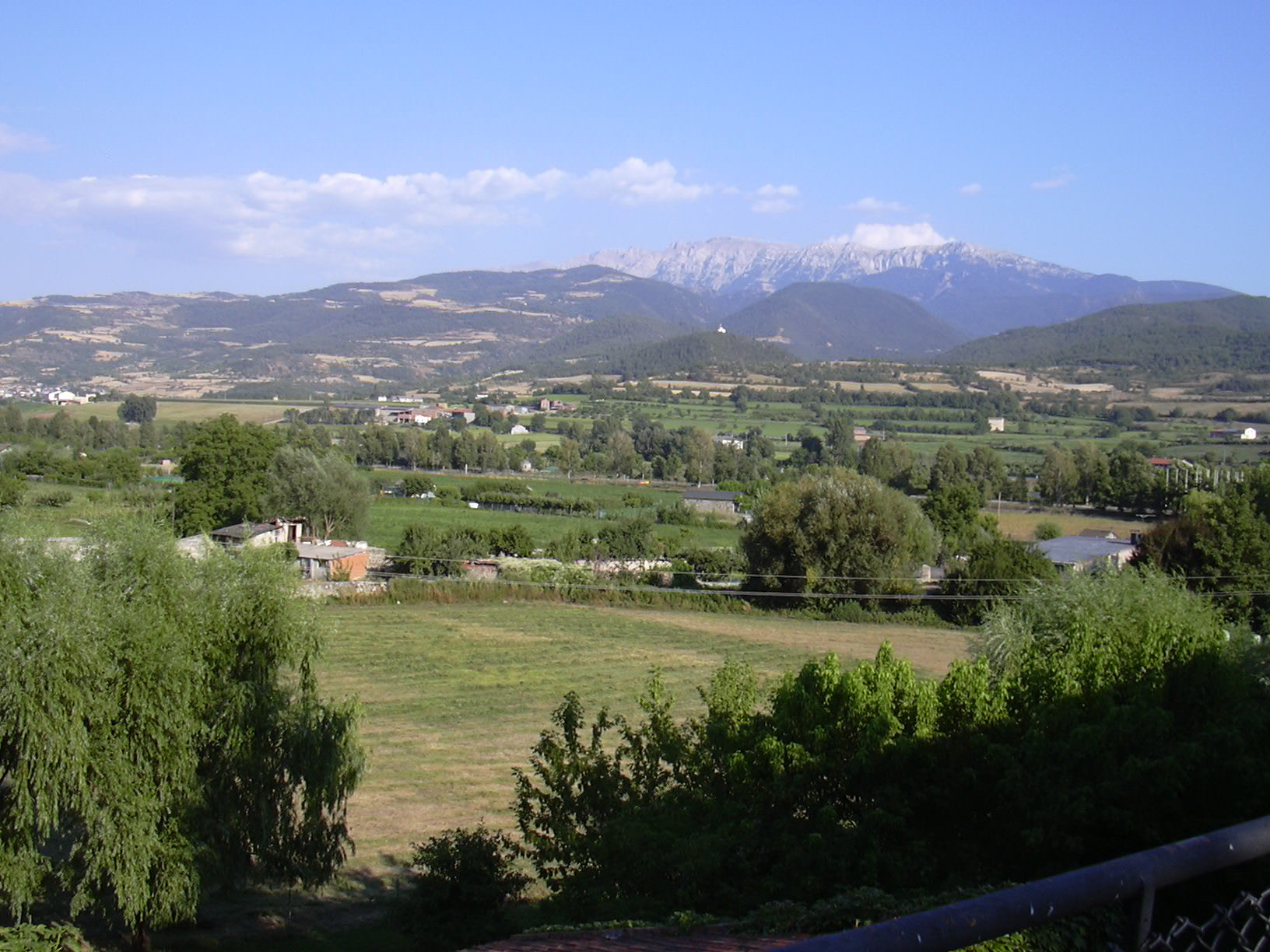 Pirineos catalanes en La Seo de Urgel, Lérida (España)